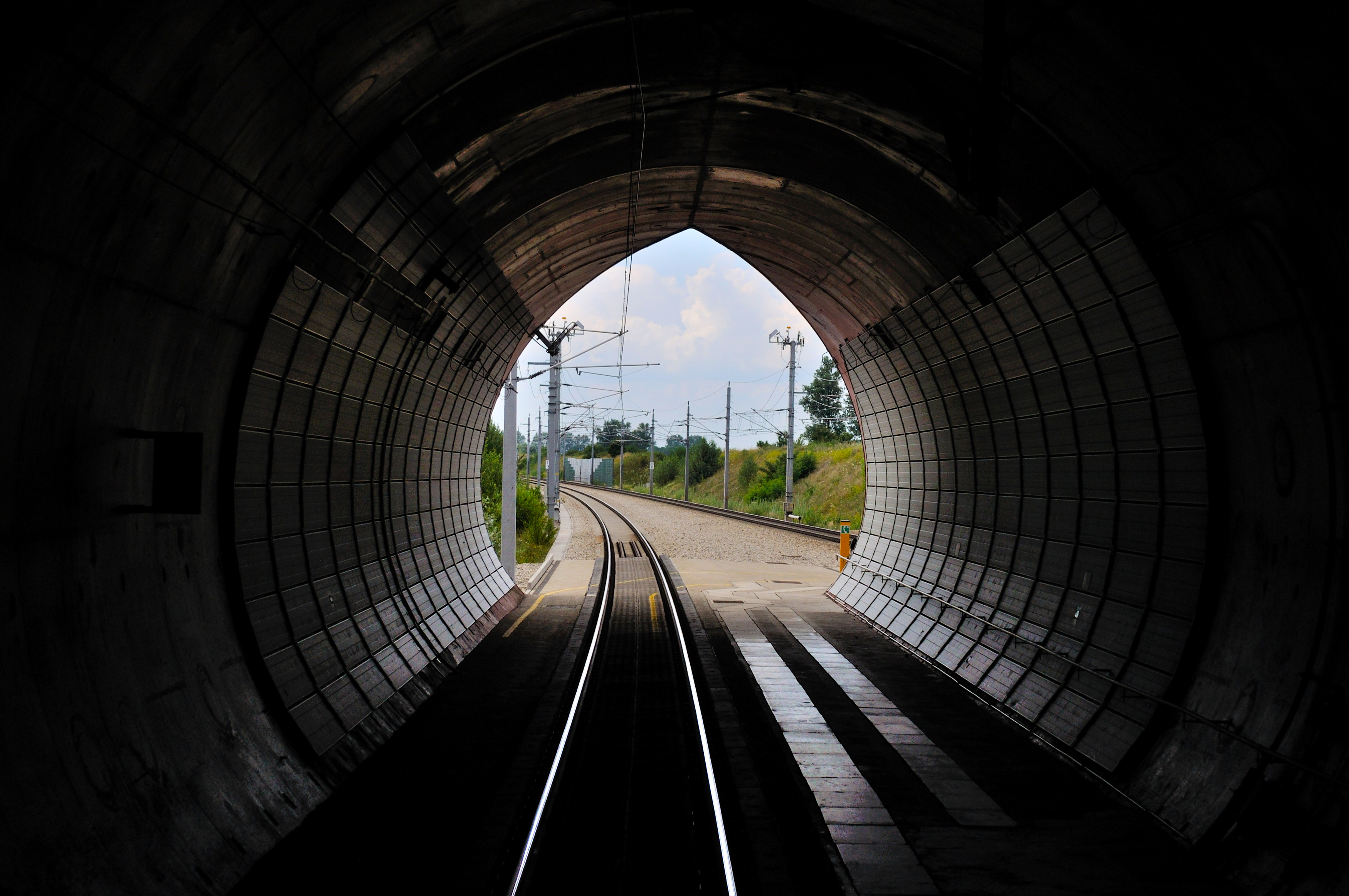 Westportal des Wienerwaldtunnels im Tullnerfeld.